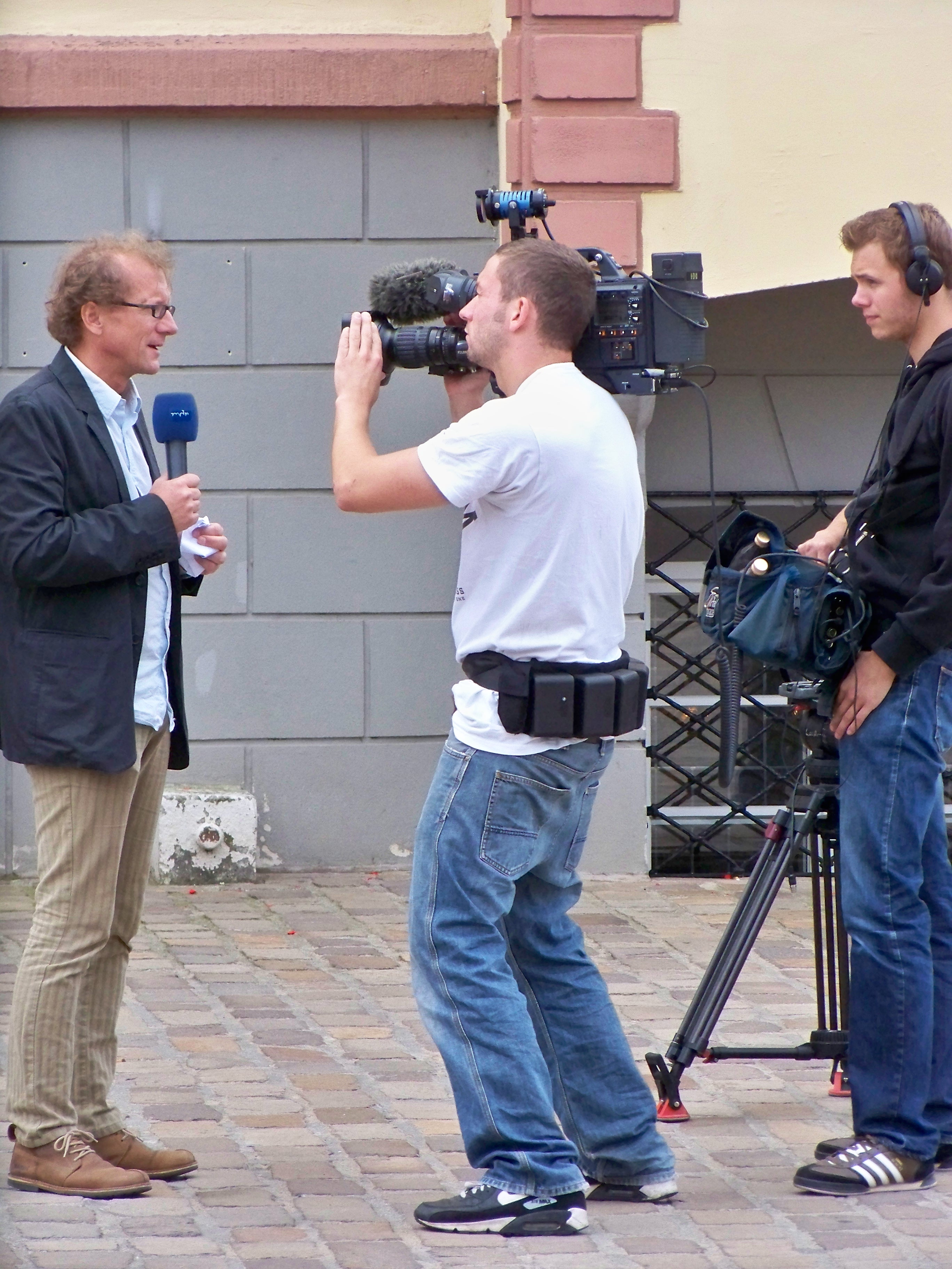 Kamerateam des Mitteldeutschen Rundfunks Fernsehen in Eilenburg